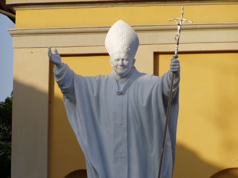 Statua di Giovanni Paolo II antistante la Chiesa di San Giulio